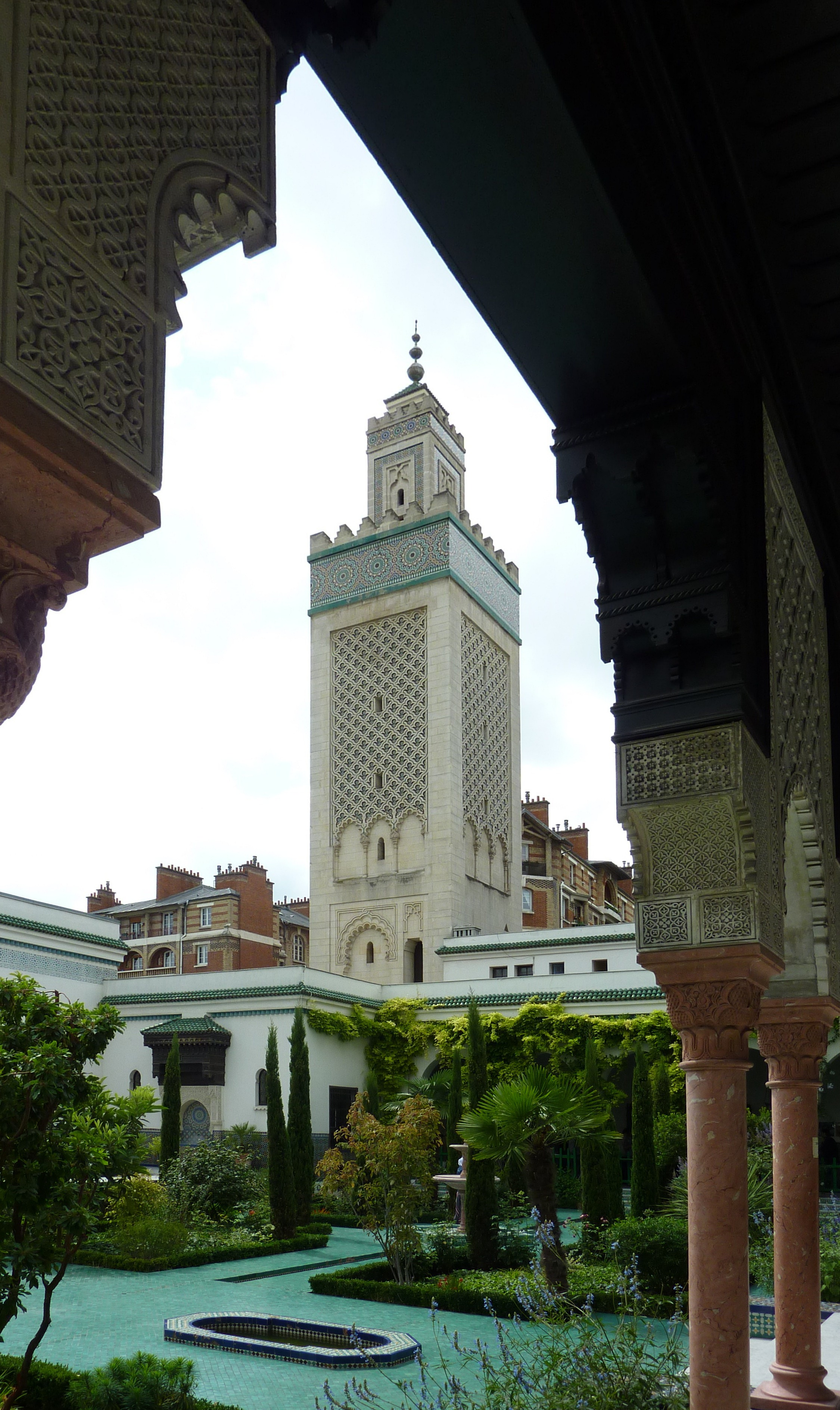 Vue sur le minaret depuis la cour intérieure de la Grande Mosquée de Paris.